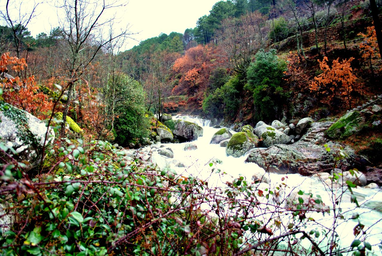 Guiasndo, Ávia.